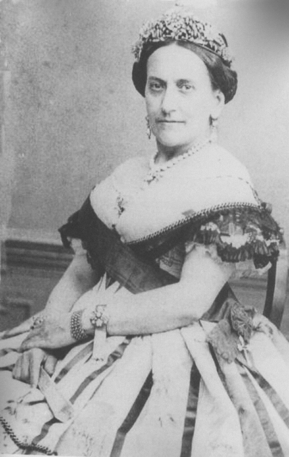 Josefa de Iturbide portrait